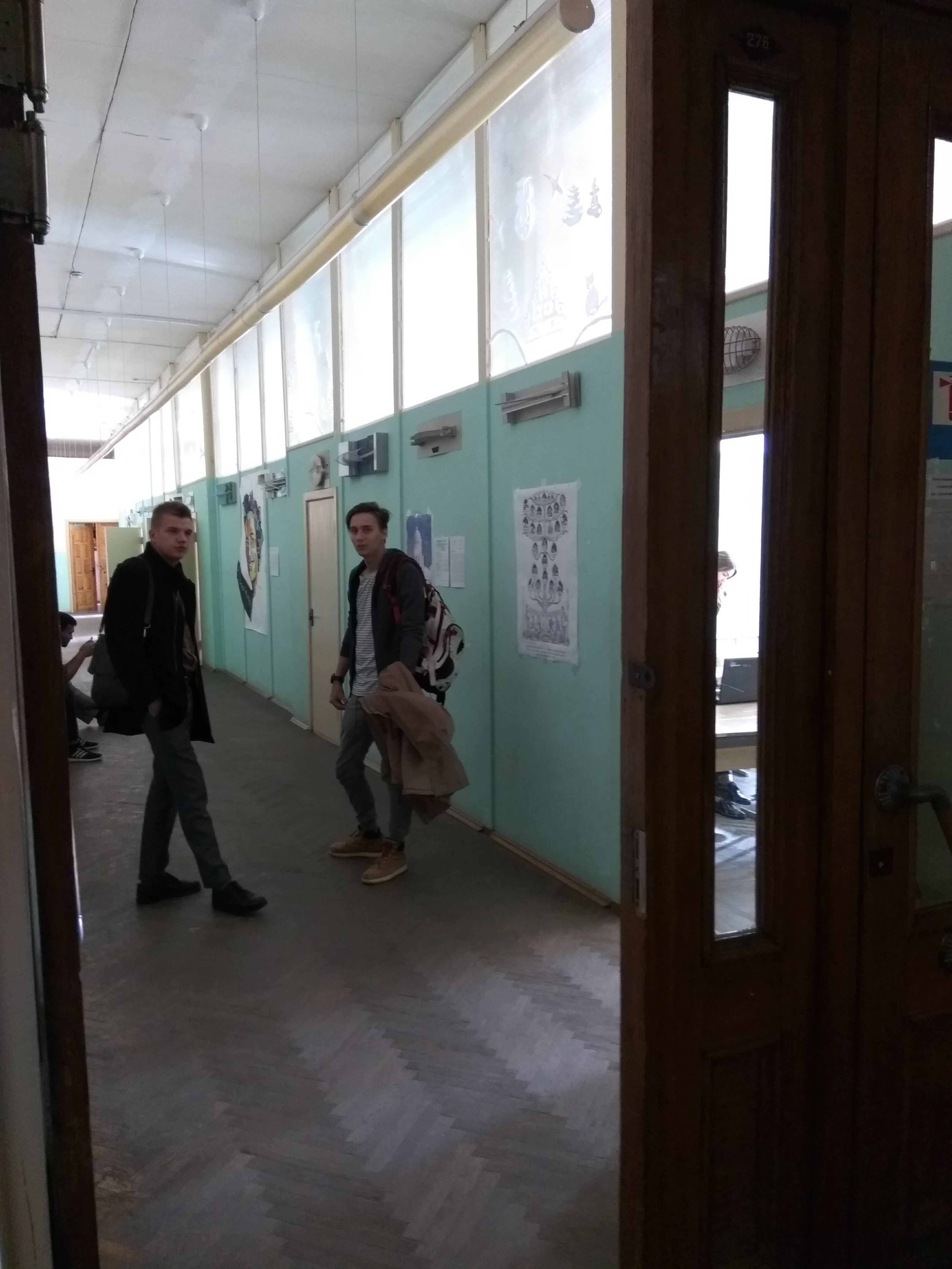 Мінск. Архітэктурны факультэт БНТУ